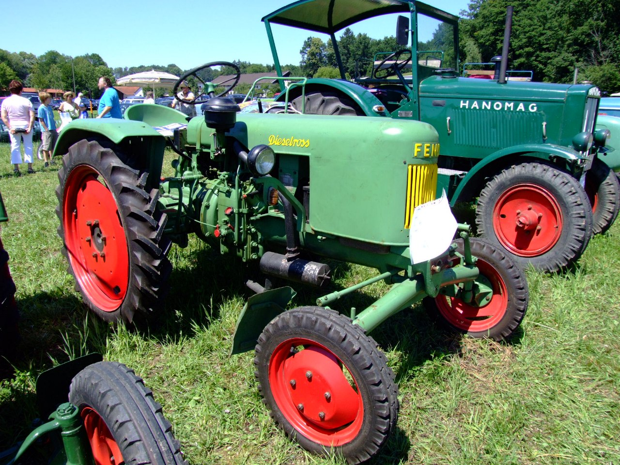 Fendt Dieselross F12HL A mit 12 PS, Baujahr 1955